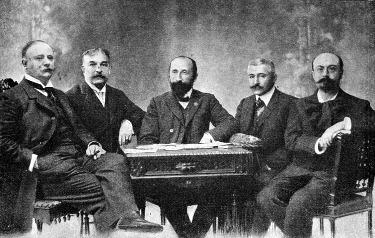 De maldekstre: Félicien Menu de Ménil, Horace Huet, Carlo Bourlet, Camille Aymonier kaj Raoul Bricard.